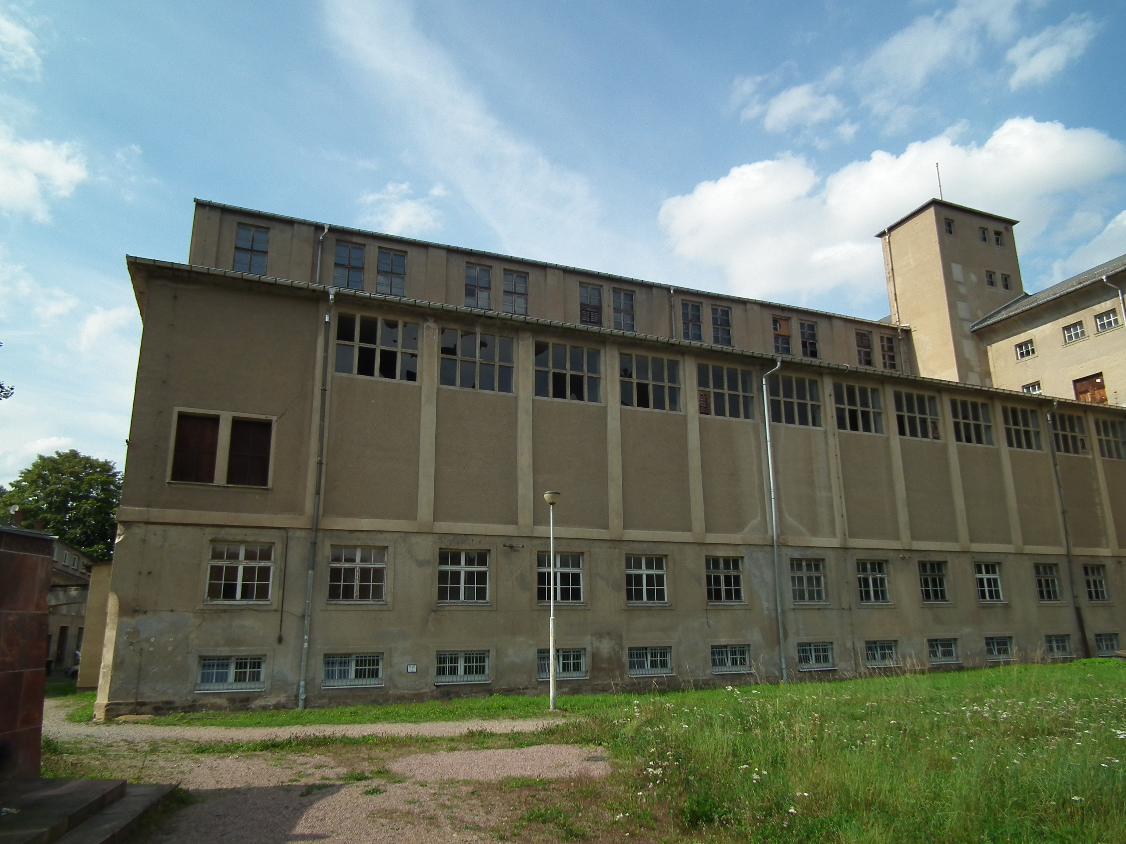 Sachsenburg